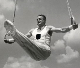 Turnen aan de ringen: De Duitse turner Stadl doet gespreide armen en de benen bij elkaar gehoekt tijdens het oefenen voor zijn oefening aan de ringen voor de Olympische Spelen, Wünsdorf bij Berlijn, Duitsland, 17 juli 1936.